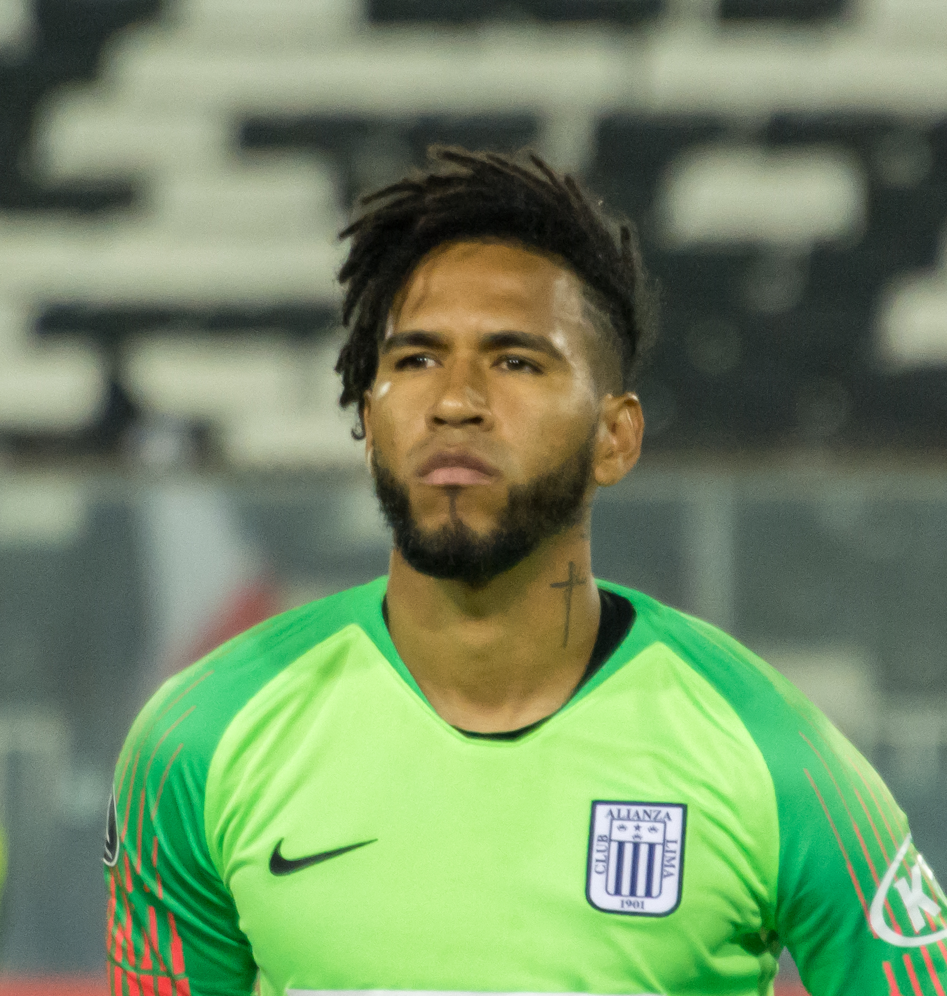 Pedro Gallese, Palestino vs Alianza Lima, Estadio Monumental, Macul, Santiago, Chile.